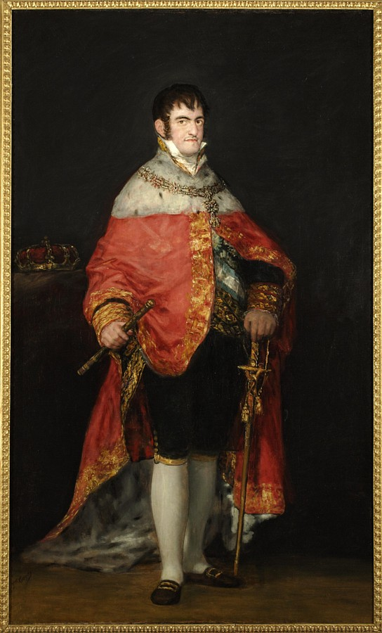 Retrato del rey Fernando VII de España (1784-1833). Es una obra con fines propagandísticos y oficiales, aunque algunos autores destacan que el monarca es mostrado con una «gran frialdad» e incluso «antipatía». Pero a pesar de ello esta obra es considerada uno de los mejores retratos que Francisco de Goya pintó del monarca cuando este regresó a España al término de la Guerra de la Independencia. Y esta obra, junto con el Retrato del Duque de San Carlos, que también se conserva en el Museo de Zaragoza, le fue encargada a Goya en septiembre de 1814 por la Junta del Canal Imperial de Aragón a propuesta de Martín de Garay, que poco antes había sido designado protector del mencionado Canal.